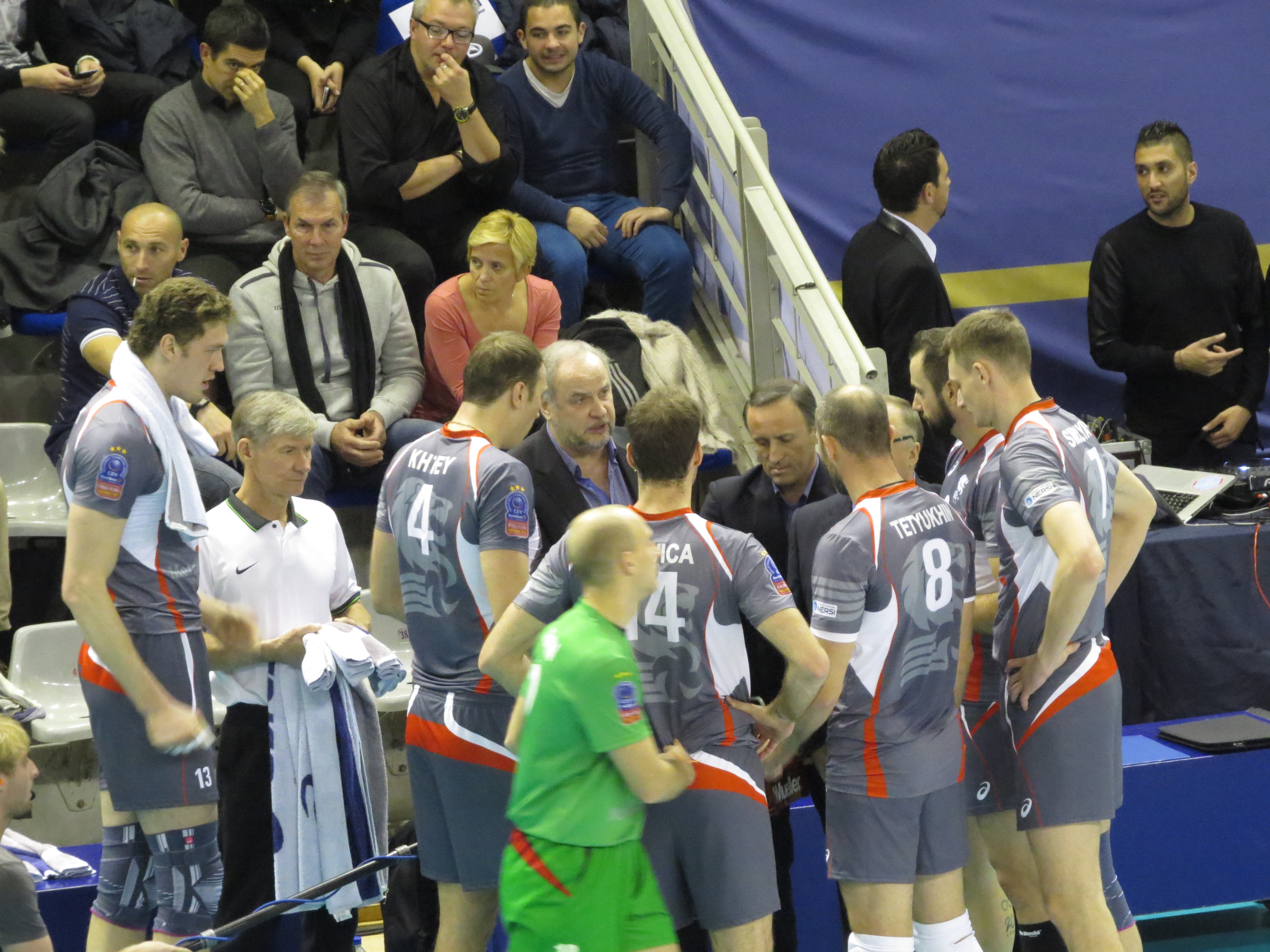 Photo réalisée lors du match de ligue des champions de volley entre le Paris Volley et le Lokomotiv Belgorod. Victoire de Belgorod 3-0